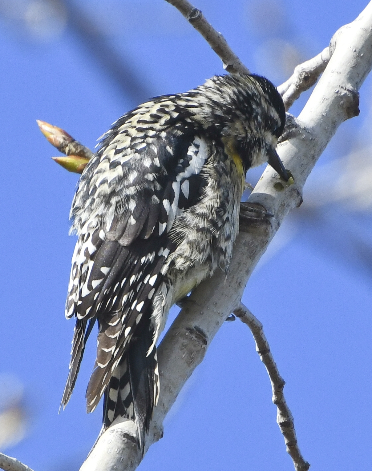 Дятел-смоктун жовточеревий (Sphyrapicus varius) - молода особина - у парку Полковника Семюела Сміта в Торонто